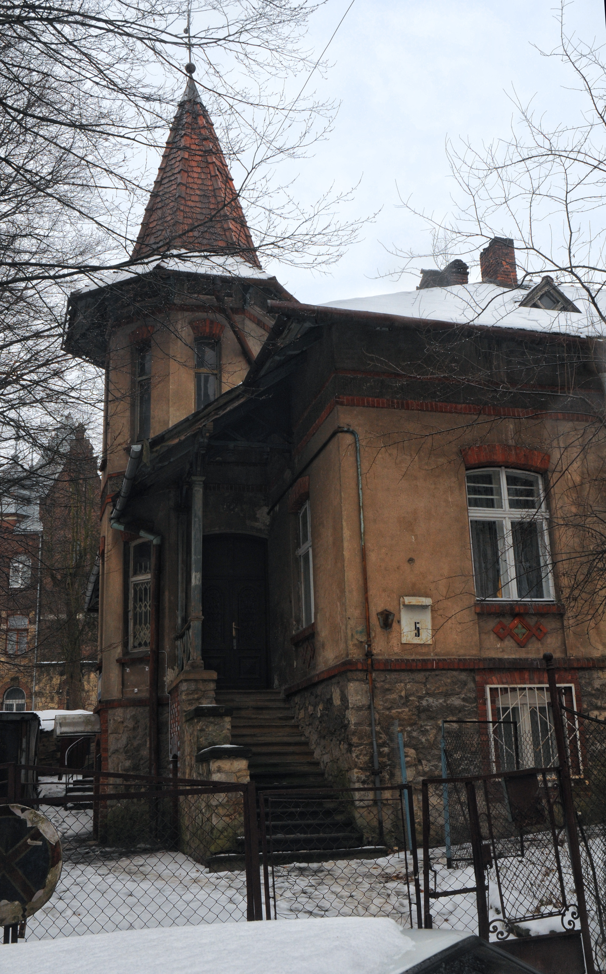 Львів, Самчука, 5